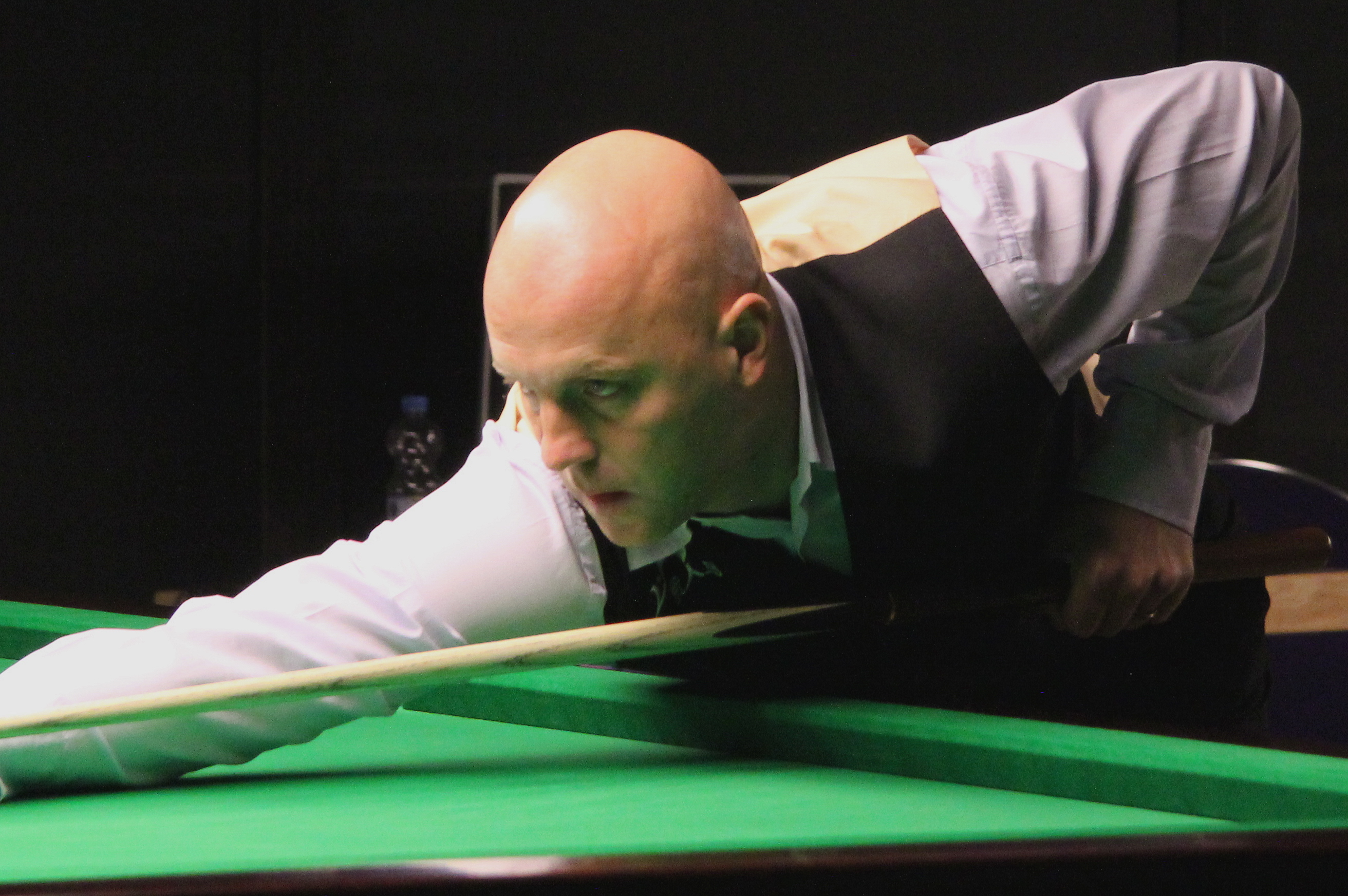 Mark King beim Paul Hunter Classic 2011